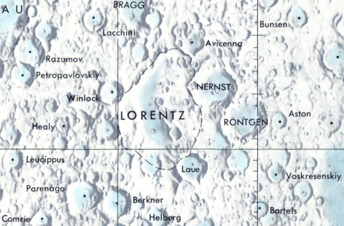 Cráter lunar Lorentz. Localización. (Plano NASA misiones Lunar Orbiter)